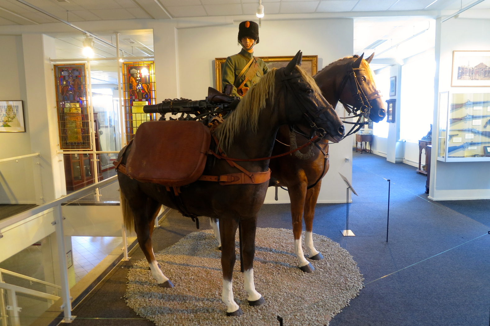 Mitrailleurpaard met Lewis mitrailleur.